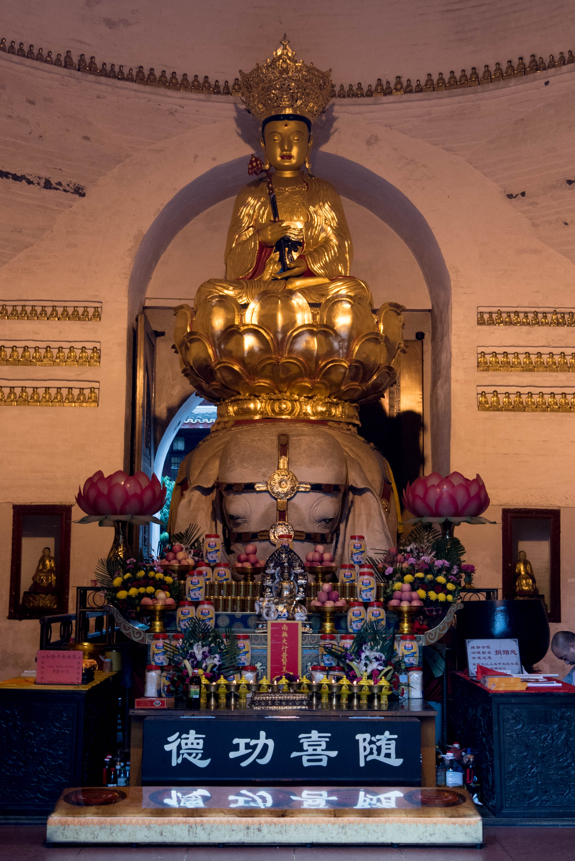 万年寺铜铁佛像